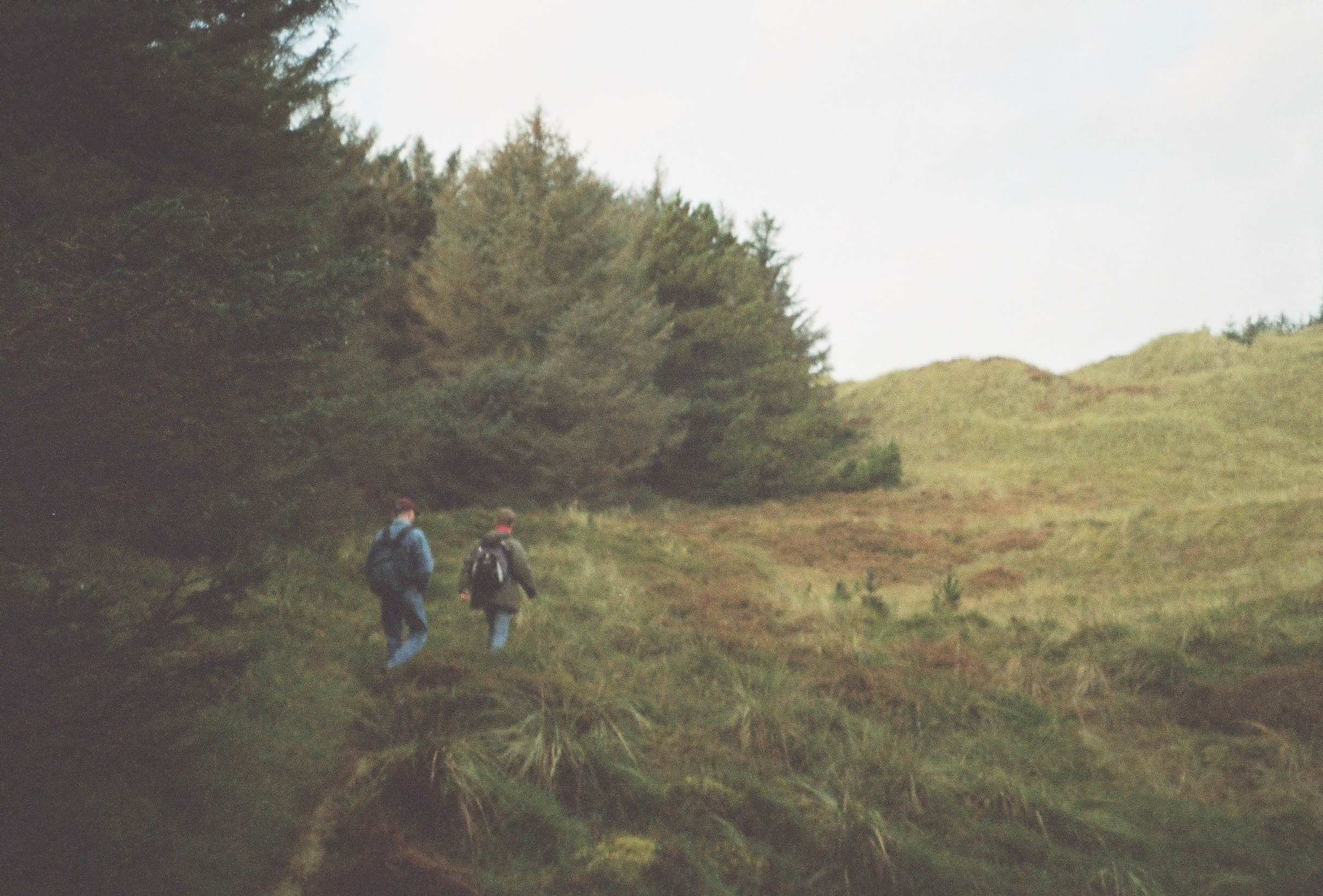 Hjortedalen, Blåbjerg Klitplantage